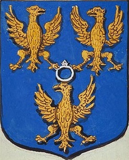 Blason de familles de Champagne in De Caumartin.